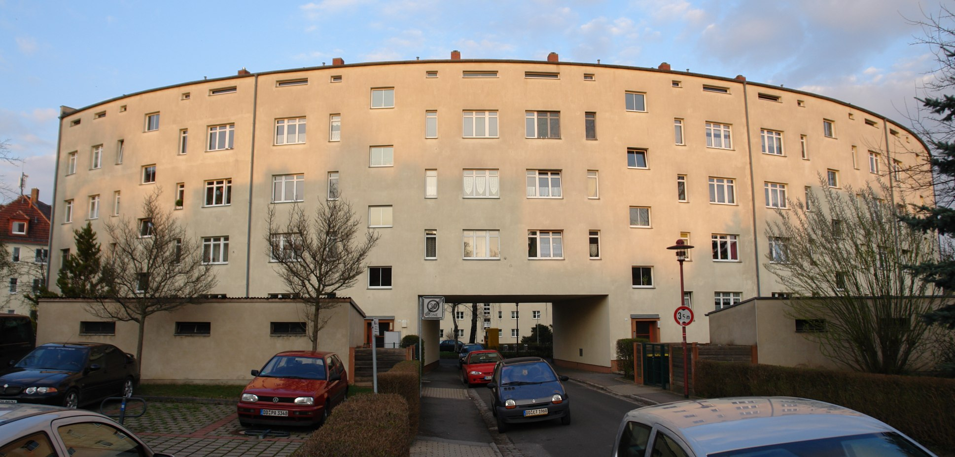 Rundhäuser 1–6.